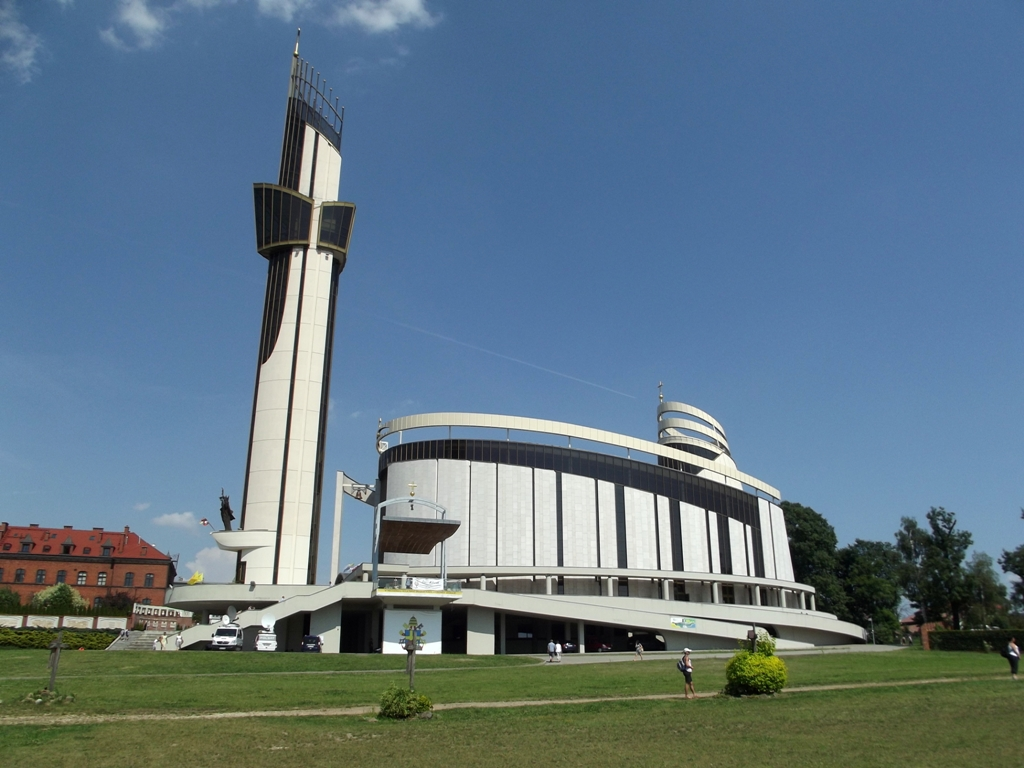 Zdjęcie zrobione podczas wydarzenia w "Rio w Krakowie", w Sanktuarium Bożego Miłosierdzia w Łagiewnikach.